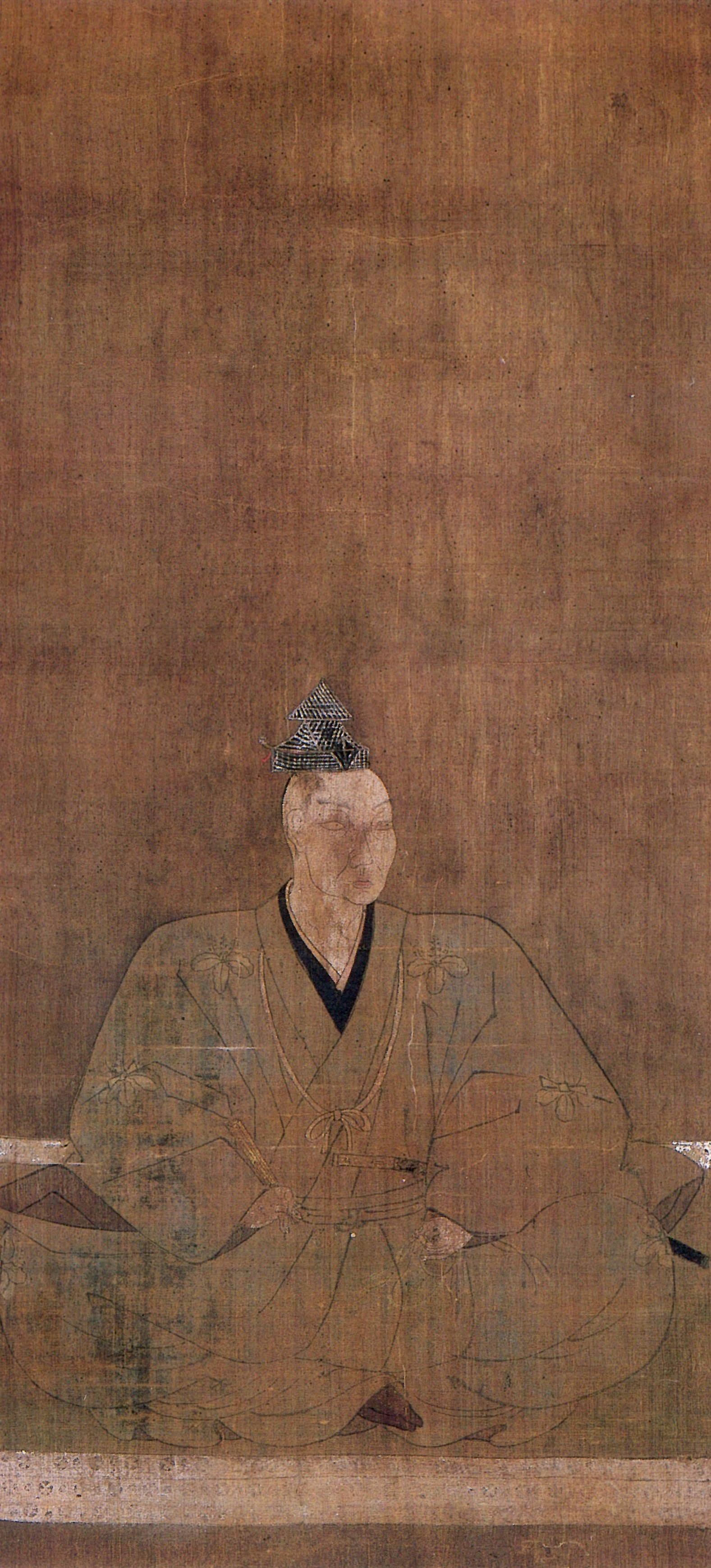 水野忠政の肖像。